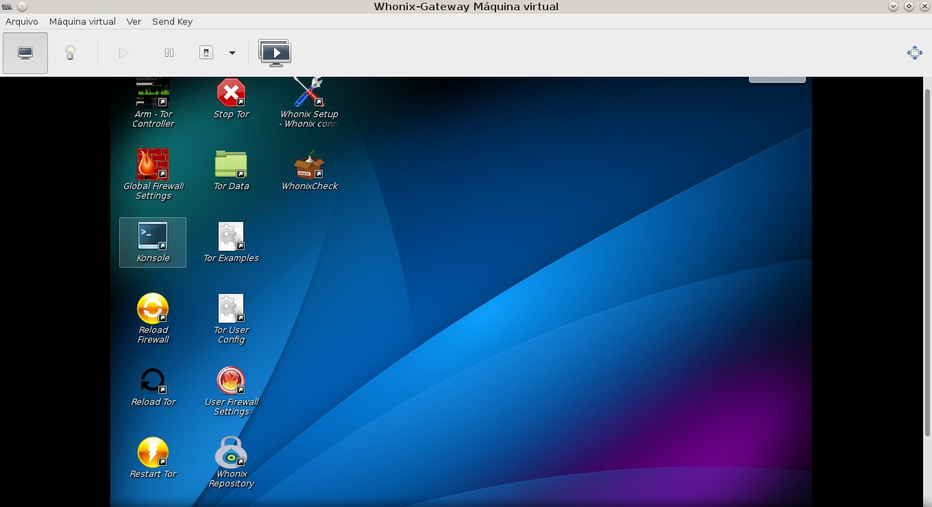 Área de trabalho do Whonix Gateway rodando sobre KVM.